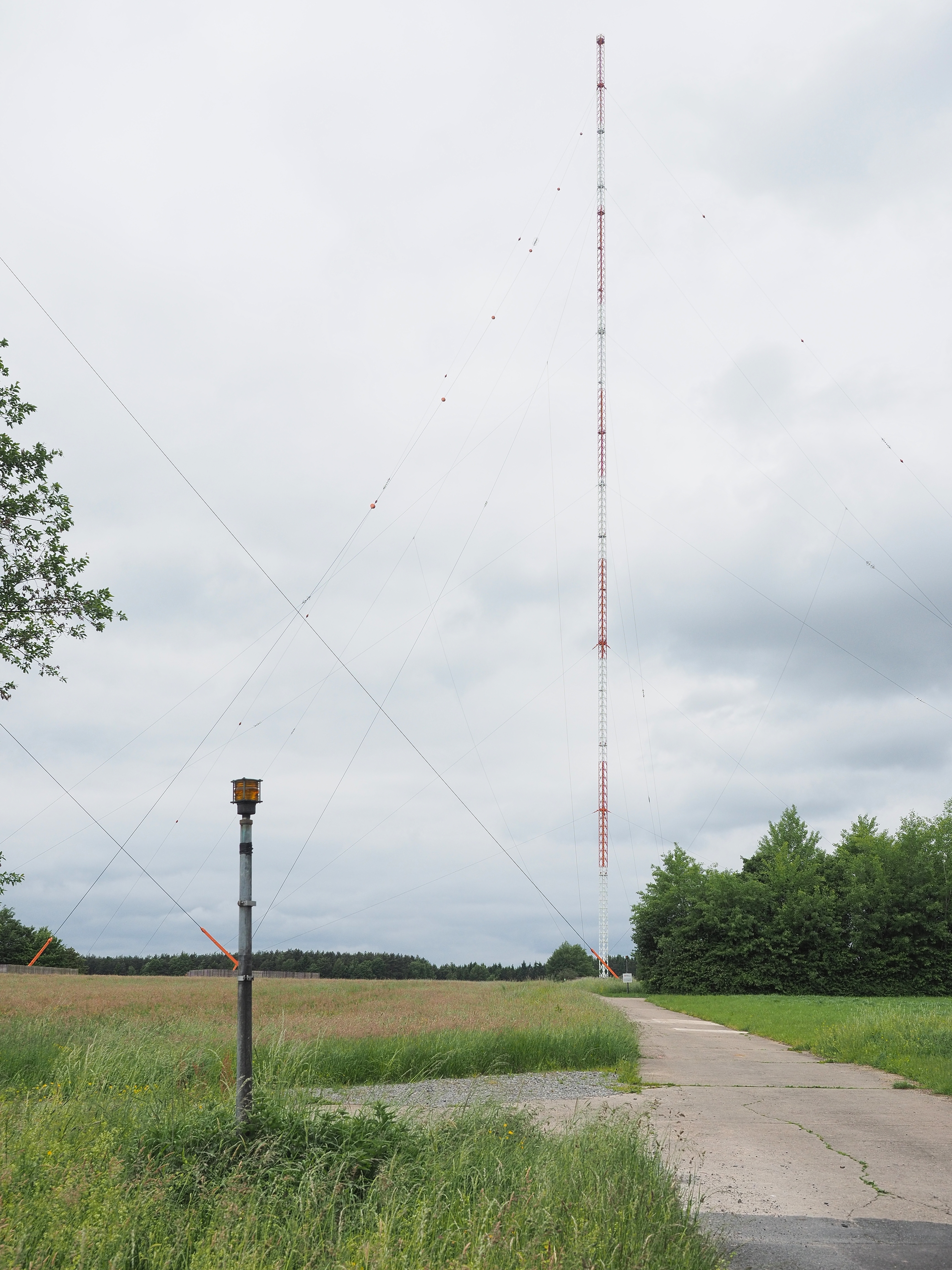 Sender Donebach, Sendemast und Warnlampe